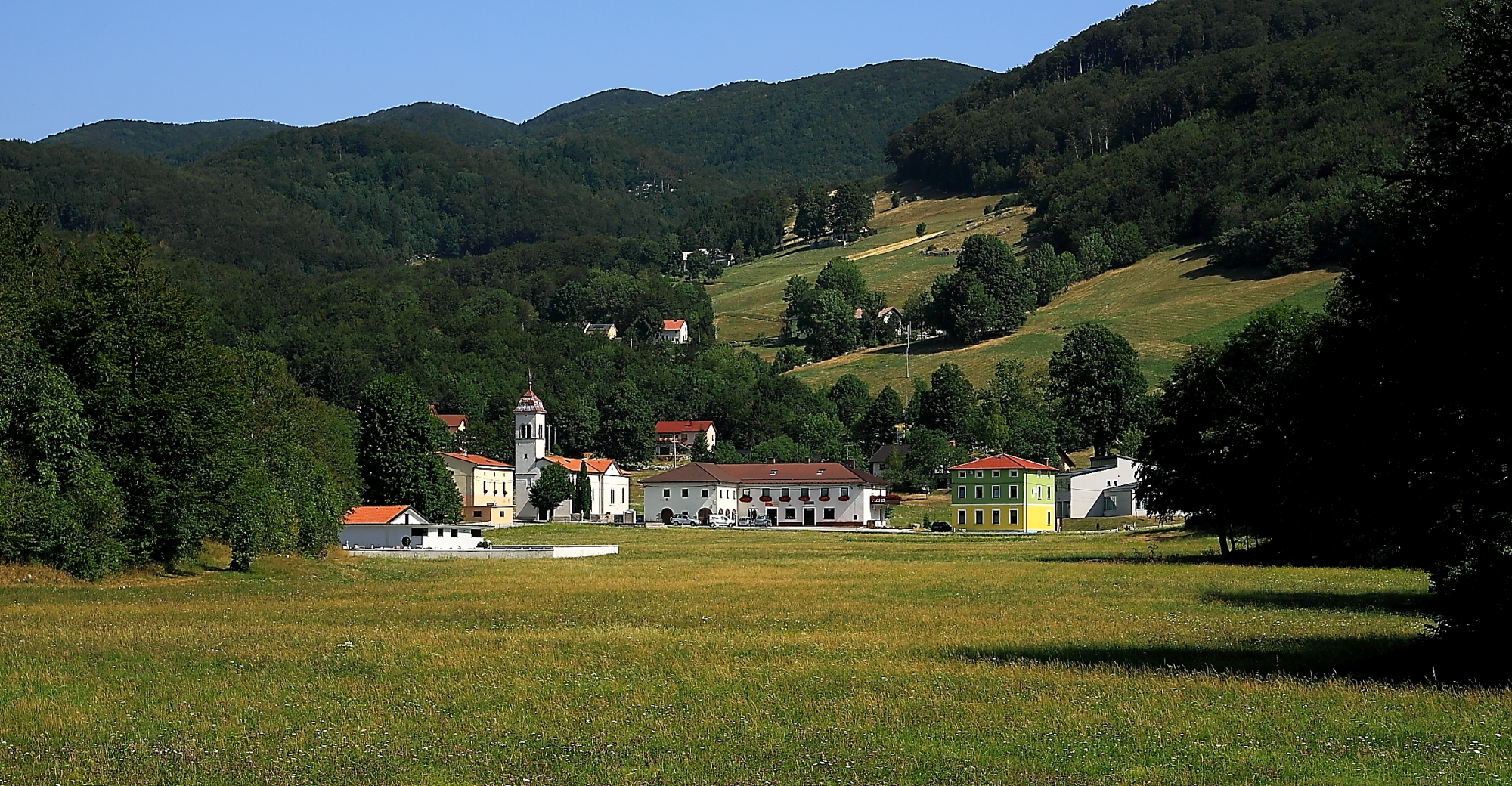 Otlica, pogled preko travnika na vas Otlica.